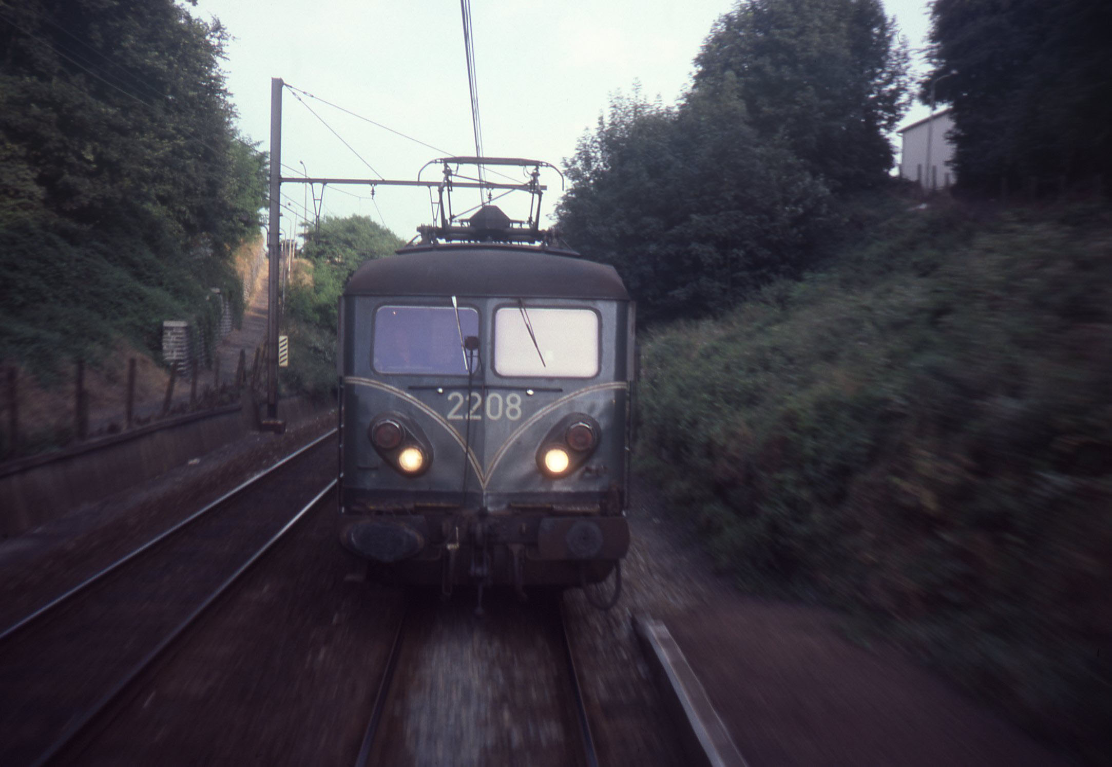 De opdruklocomotiel 2208 stopt met het duwen en is aan het afremmen. Goed te zien is stootbuffer drukmeter. Indien de geduwde trein remt, moet de machinist namelijk onmiddellijk stoppen met duwen. De perronrand is van de afgeschafte halte Montegnée.